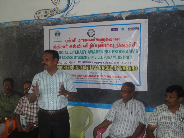 பள்ளி மாணவர்களுக்கான நிதிசார் கல்வி விழிப்புணர்வு கருதரங்கம்